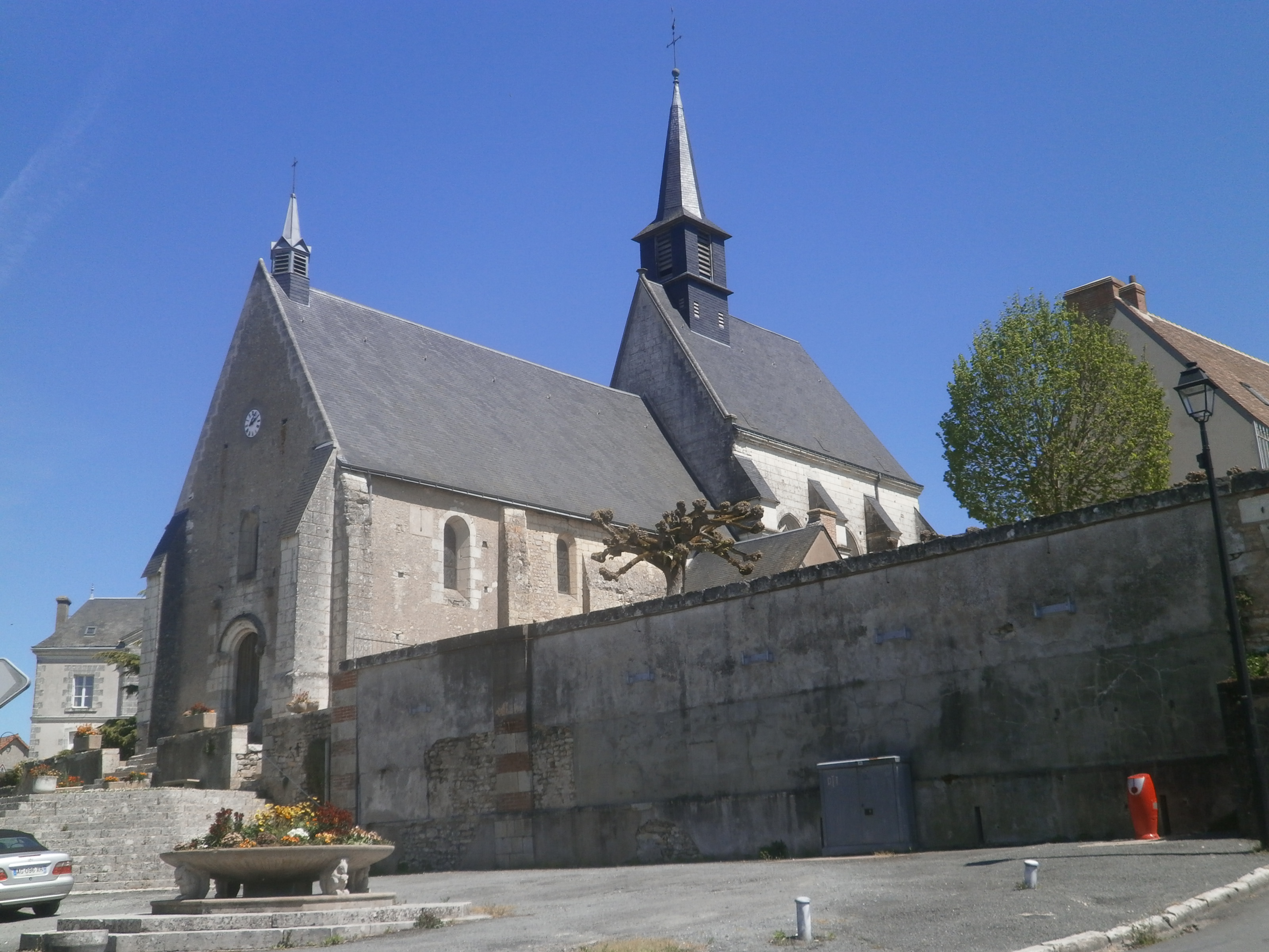 L'église de Francueil.